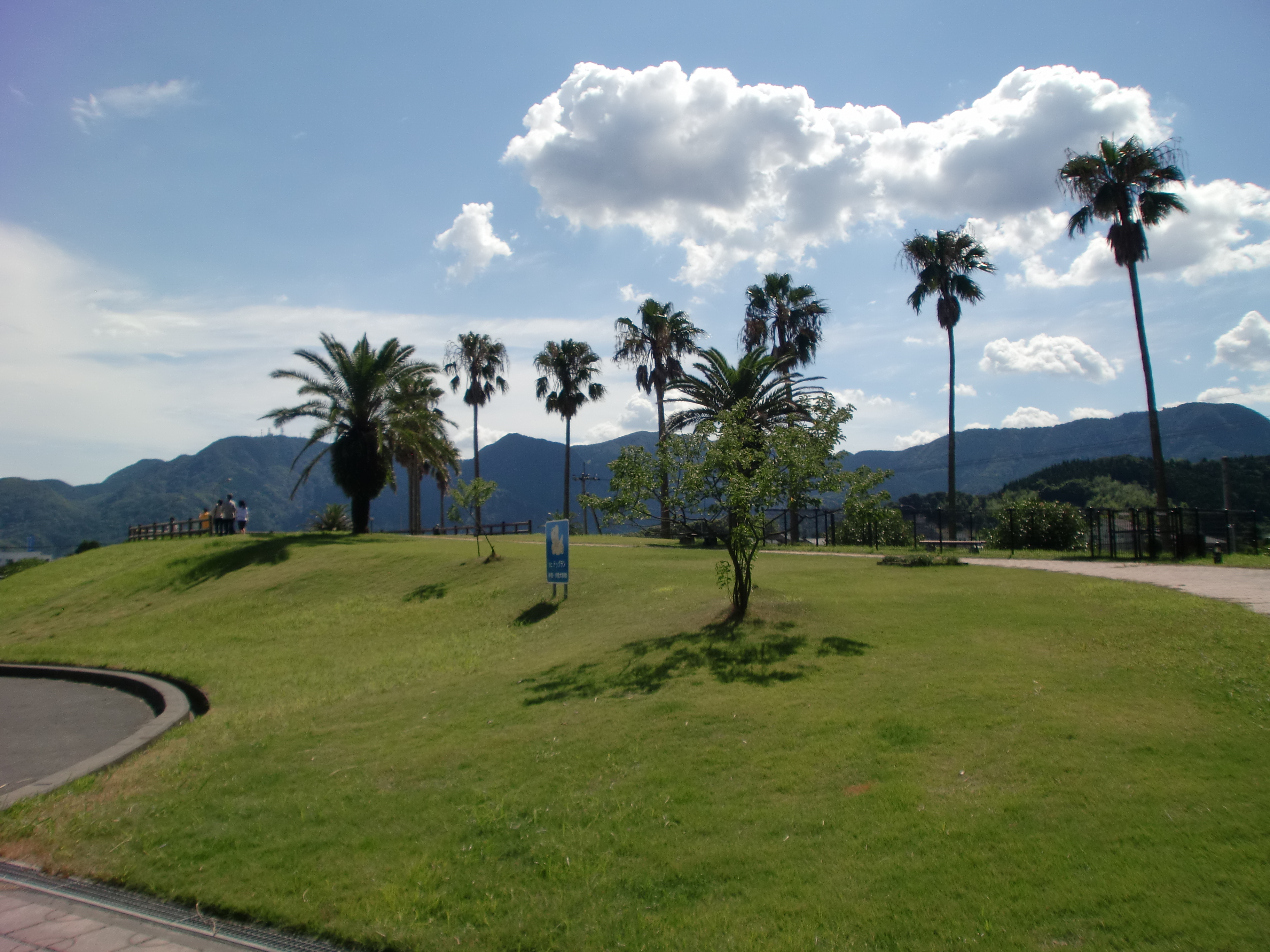 桜島サービスエリア（上り線：熊本方面）のドッグラン。